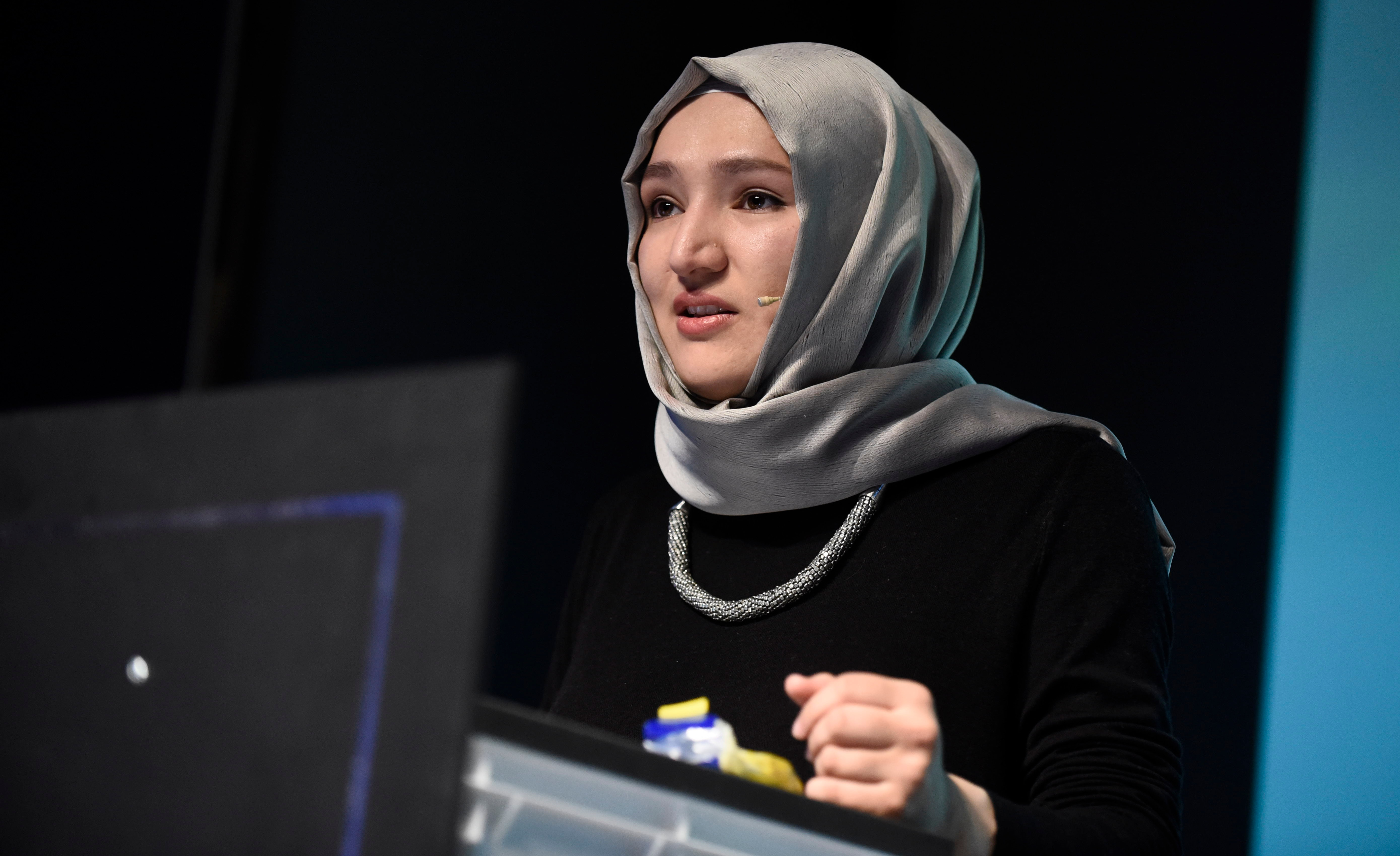 Kübra Gümüsay mit „Organisierte Liebe“ am 03.05.2016 auf der re:publica in Berlin. Foto: re:publica/Gregor Fischer CC BY 2.0